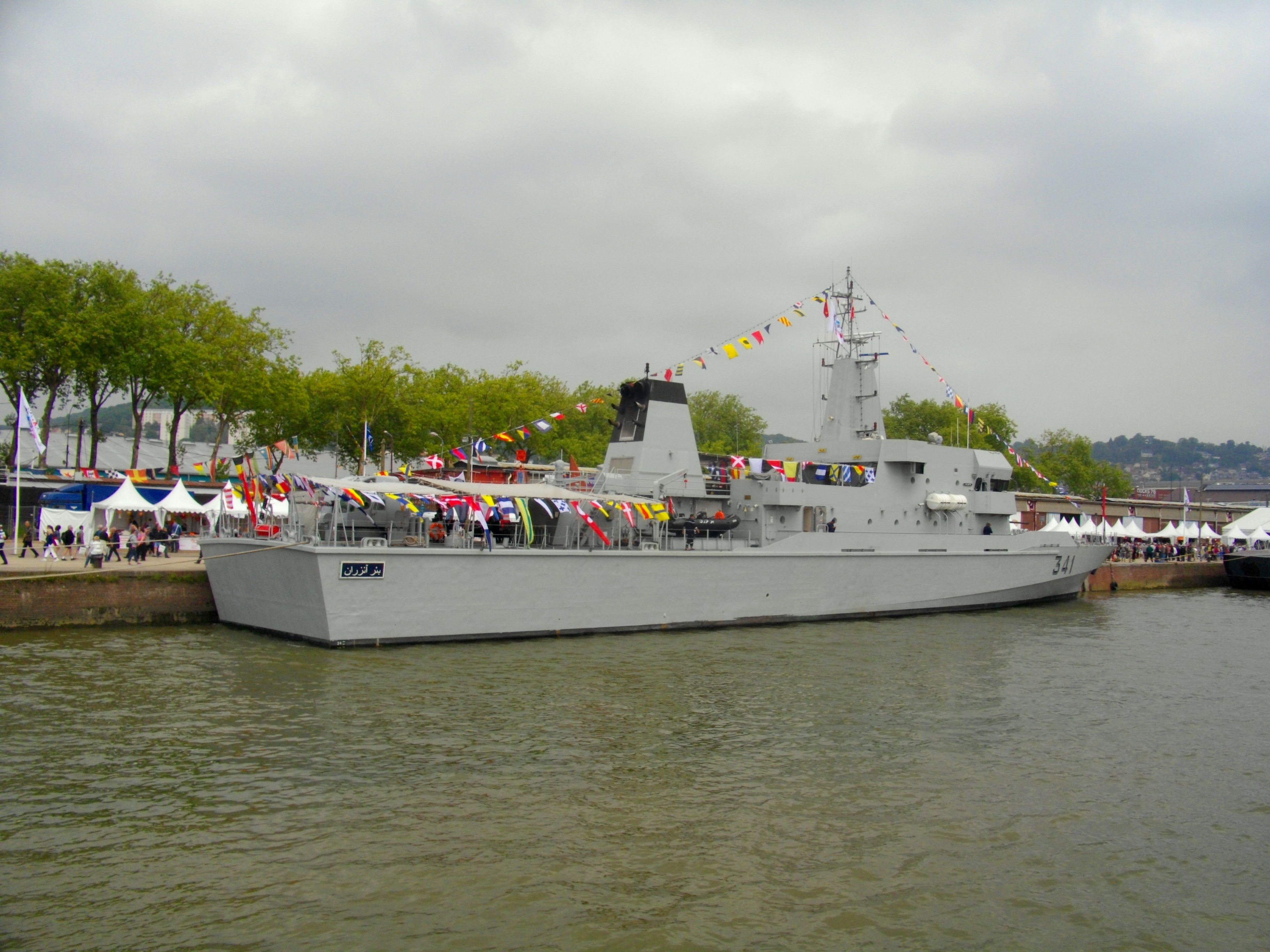 Le patrouilleur marocain Bir Anzarane (341)